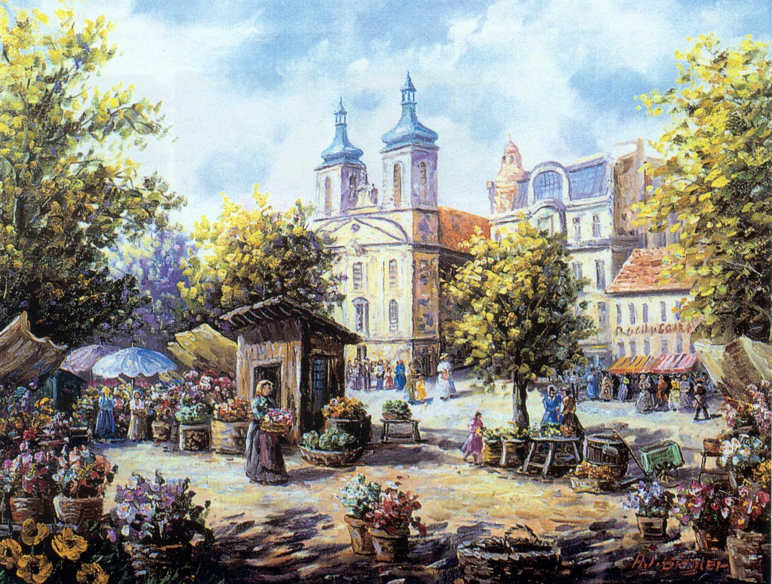 Wien Rochusmarkt Blumenmarkt 19th century